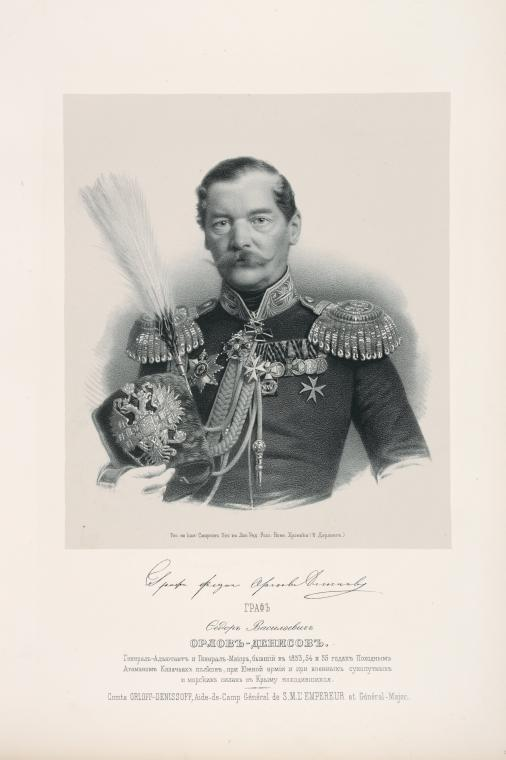 генерал Фёдор Васильевич Орлов-Денисов